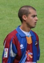 El futbolista granota Juanma